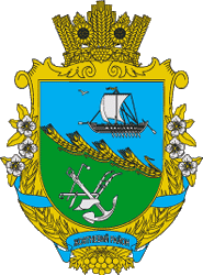 Герб Жовтневого району